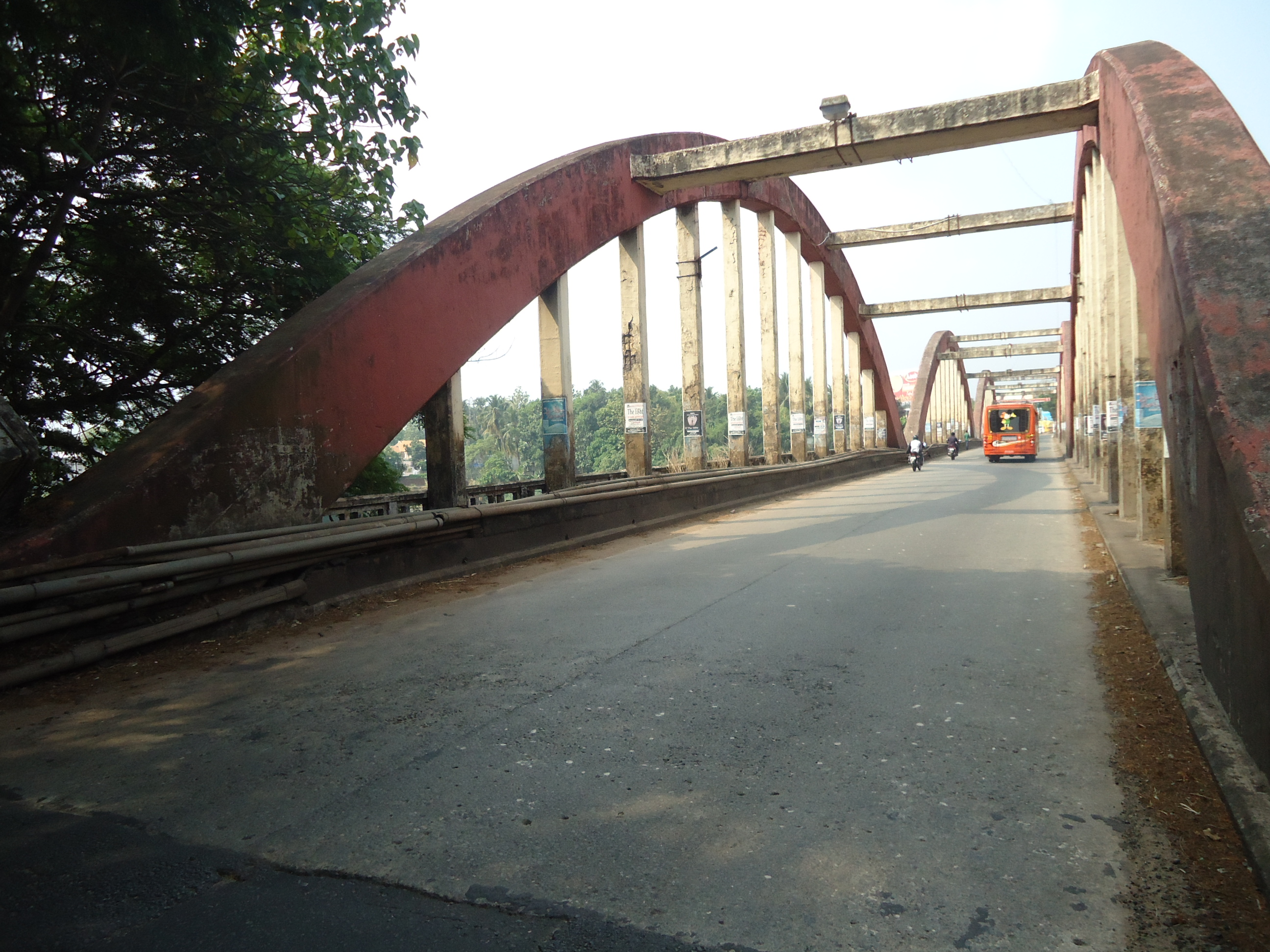 Mangalapuzha Bridge Aluva 1